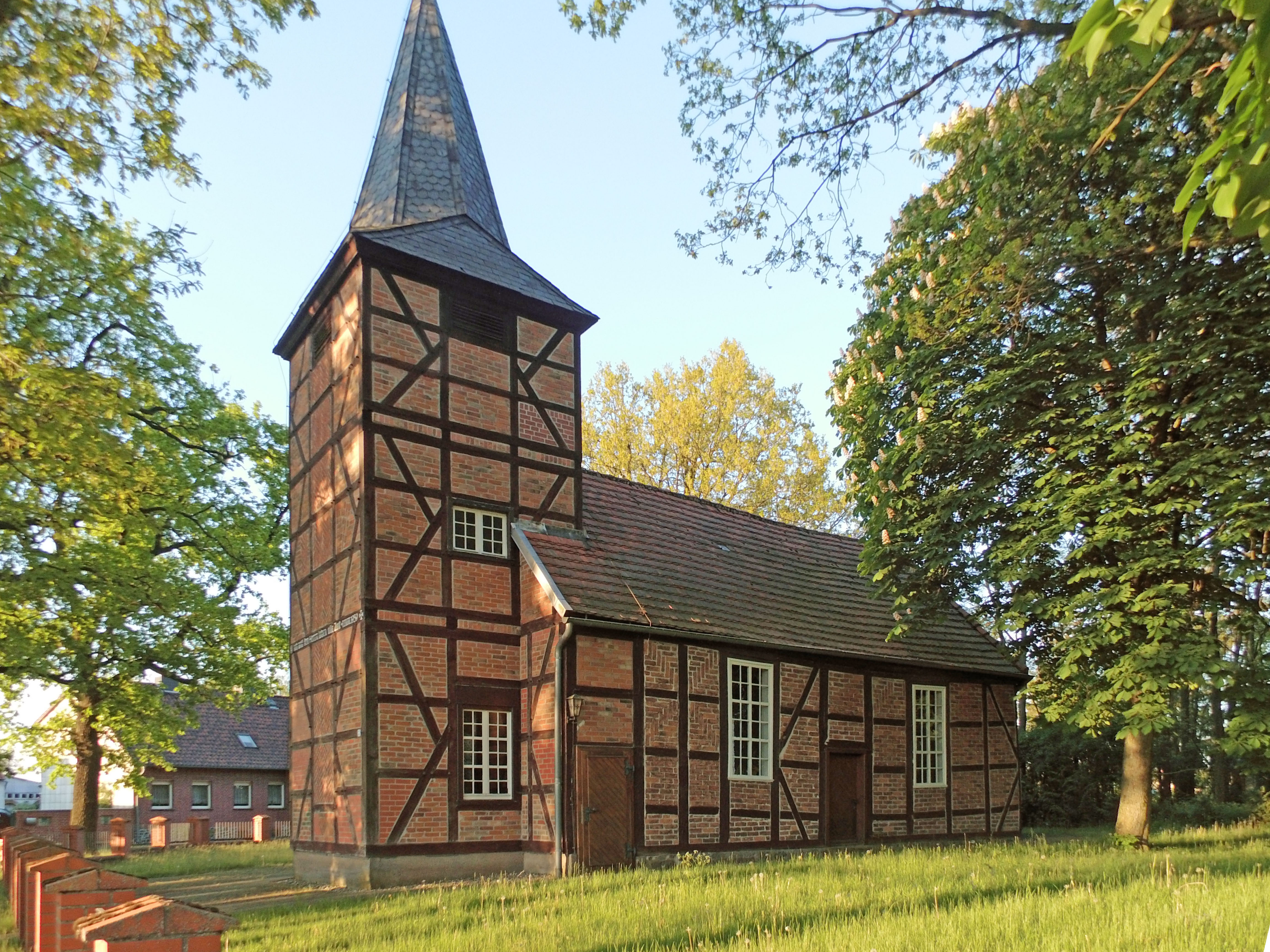 Ev. Kirche in Sichau bei Gardelegen